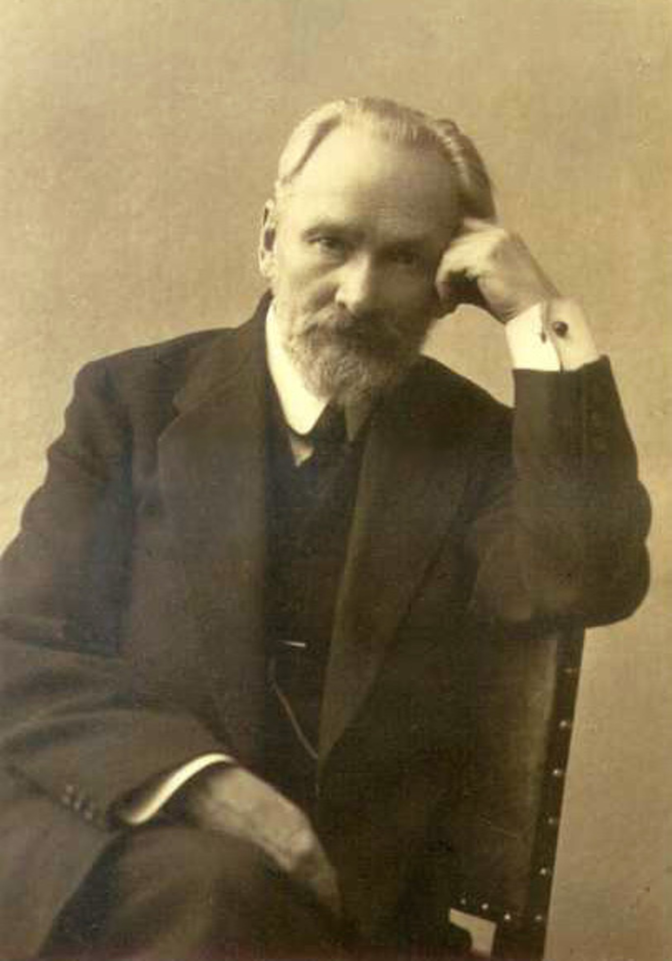 Василий Васильевич Розанов (1856— 1919) — русский религиозный философ, литературный критик и публицист.